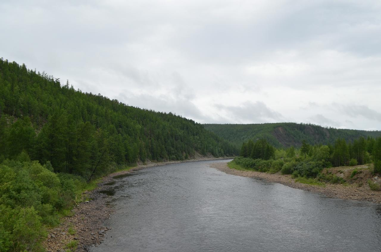 Нерюнгри. Река Чульман с моста в районе станции Нерюнгри-Грузовая. Вид вниз по течению